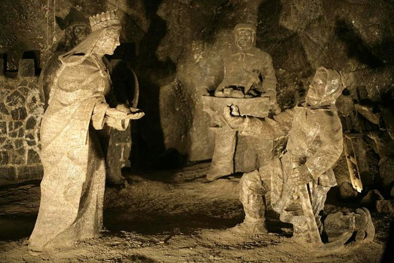 Solna rzeźba Świętej Kingi i górników w kopalni soli w Wieliczce ilustrująca legendę o pierścieniu świętej Kingi